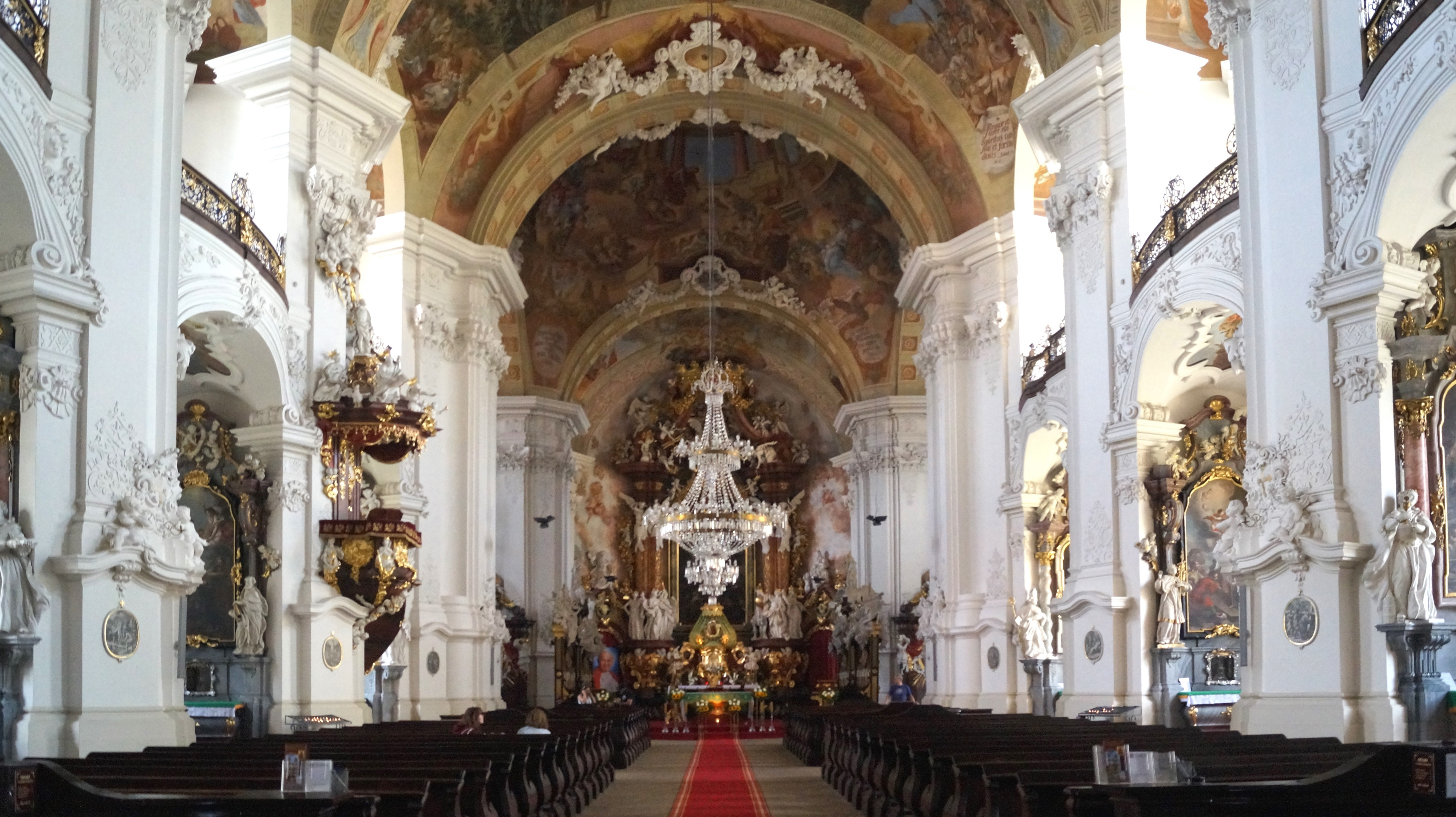 Kloster Grüssau - Kirchenraum